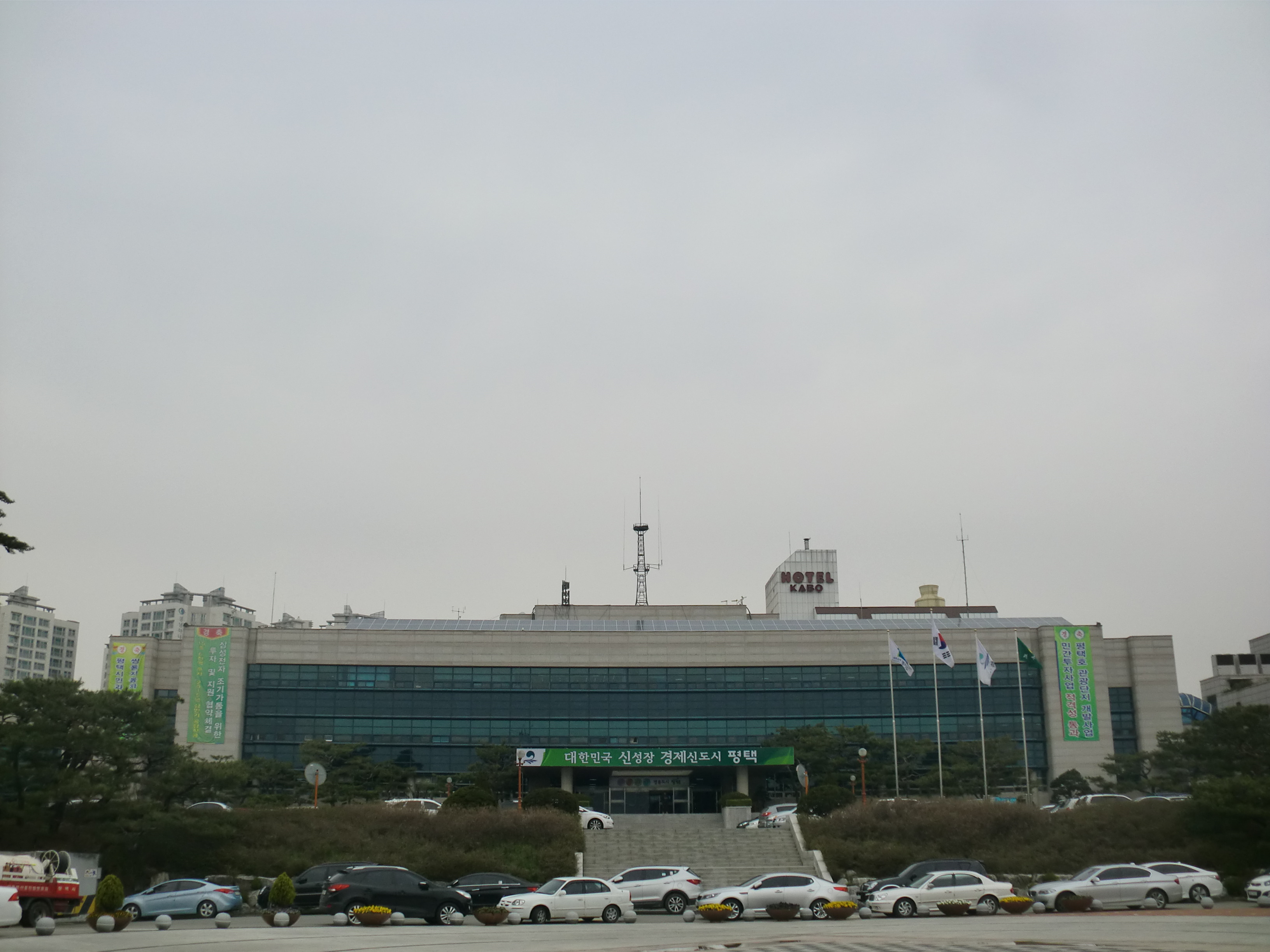 경기도 평택시에 있는 평택시청